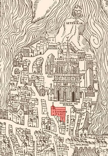 Ausschnitt aus dem Plan de Bâle von 1552 (die Kirche Sainte-Christophe und Fulberts vermutetes Haus rot markiert)